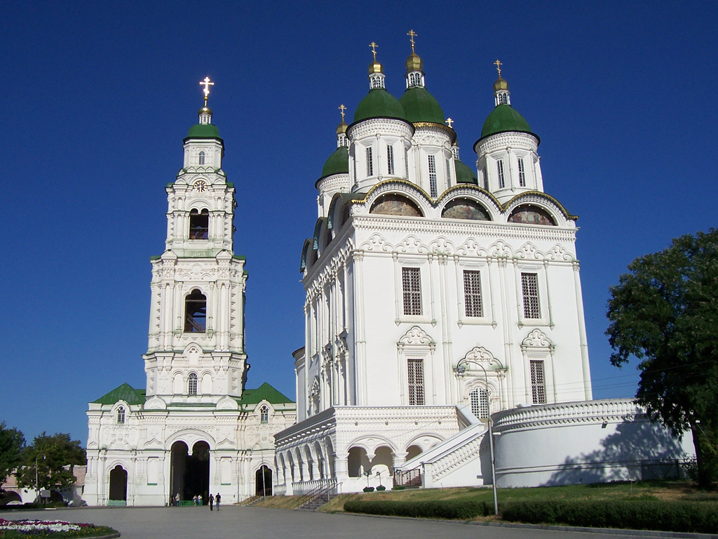 Успенский собор и Пречистенские ворота с надвратной соборной колокольней, вид с запада, Астраханский кремль, город Астрахань.